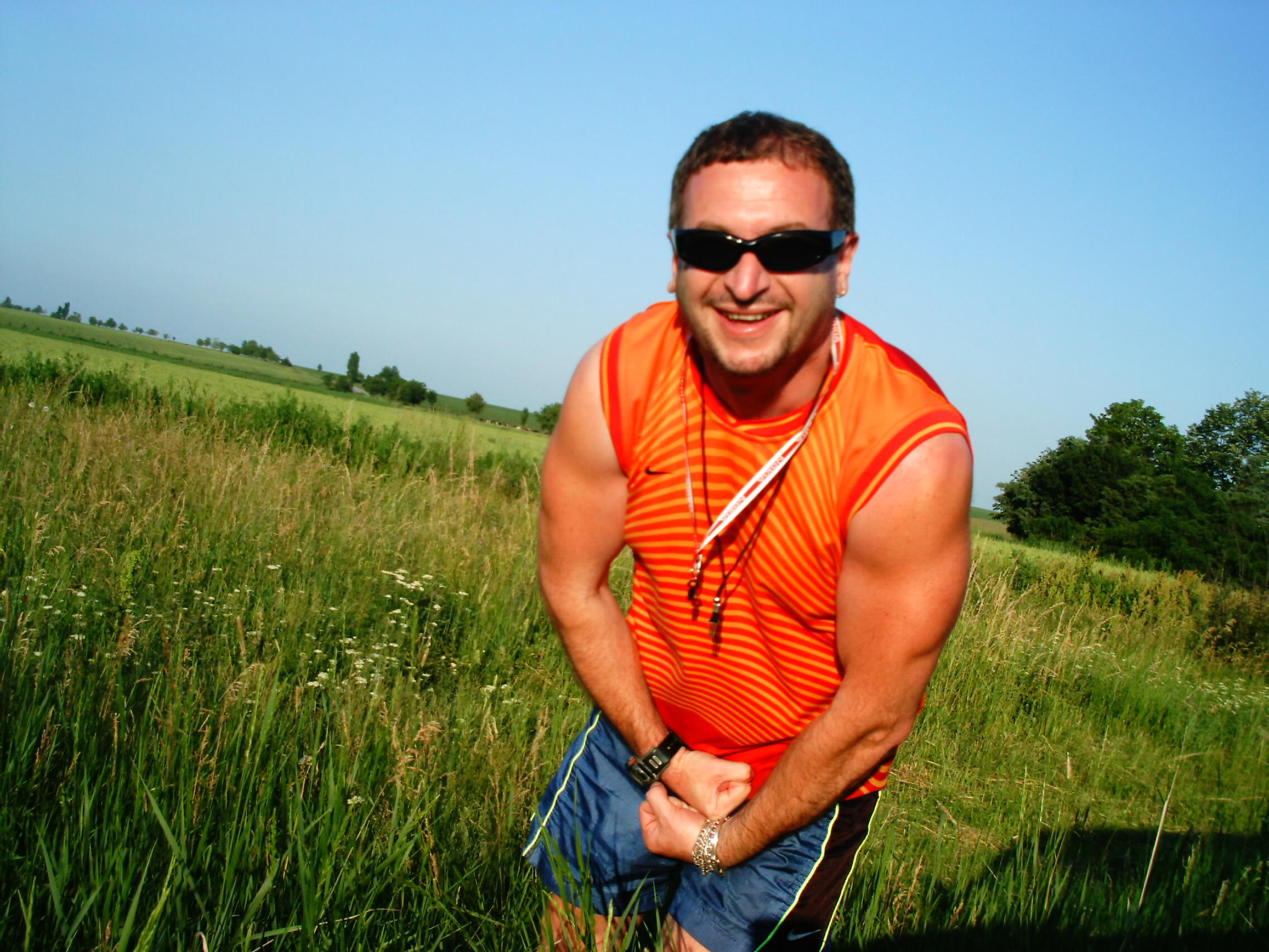 Кембъла позира за "Био Дар"